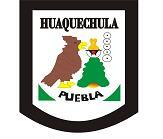 El Escudo del Municipio y ciudad de Huaquechula, Estado de Puebla, México.